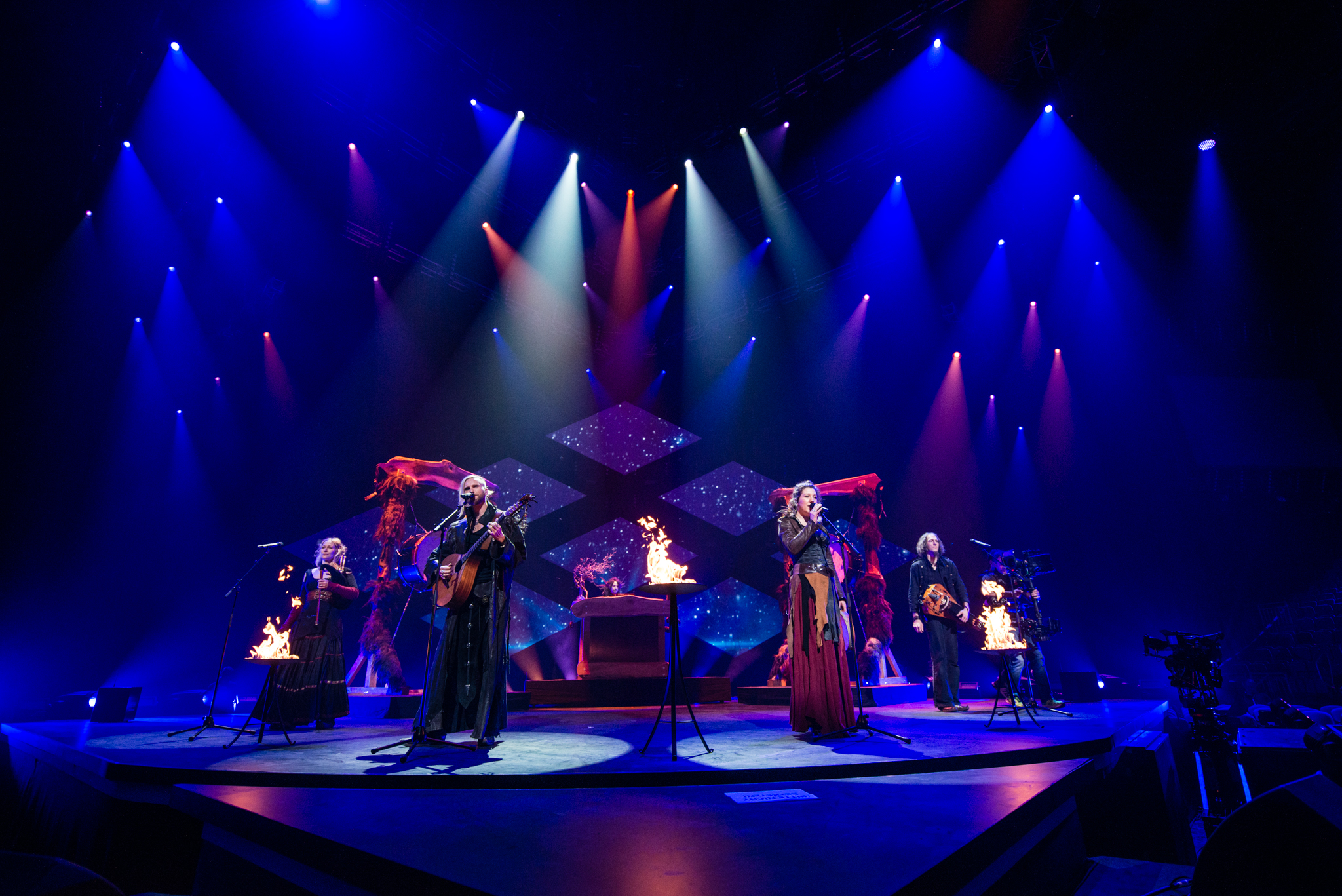 'Eurovision Song Contest 2015 - Unser Song für Österreich': 'Faun'